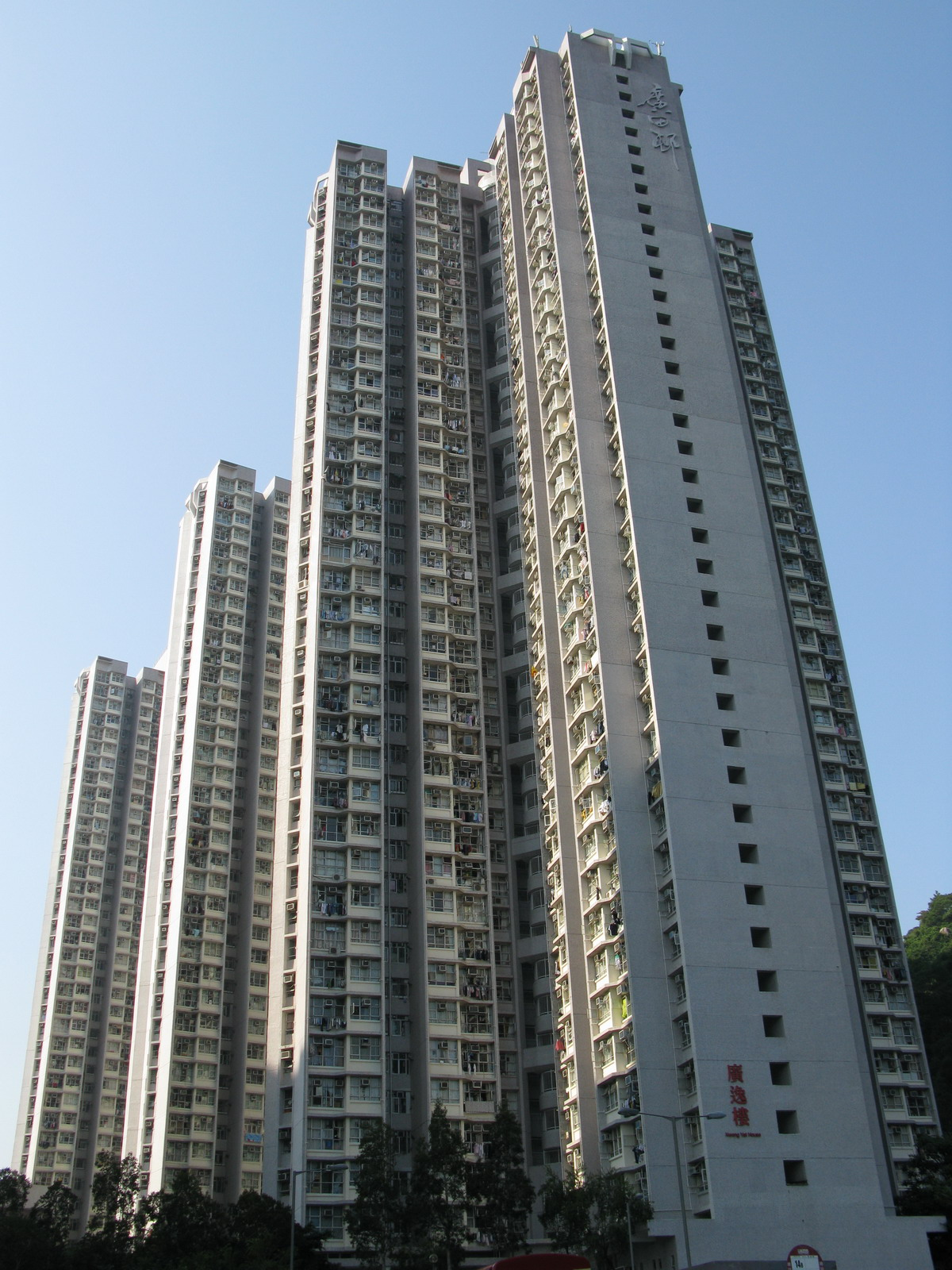 廣田邨 Kwong Tin Estate